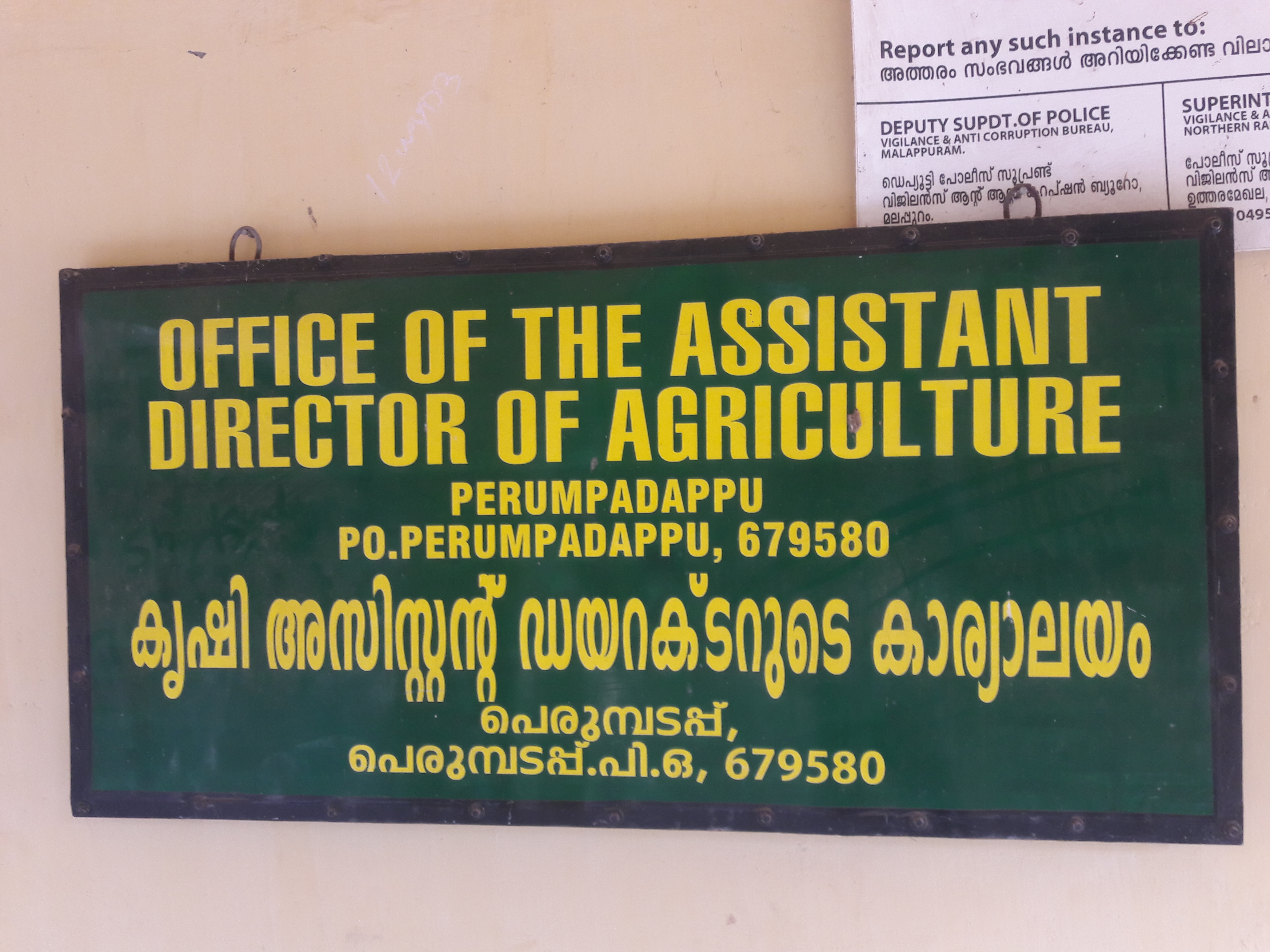 പെരുമ്പടപ്പ്‌ ബ്ലോക്കിലെ കൃഷി അസിസ്റ്റന്റ് ഡയറക്ടറുടെ കാര്യാലയ സൂചനാ ഫലകം.